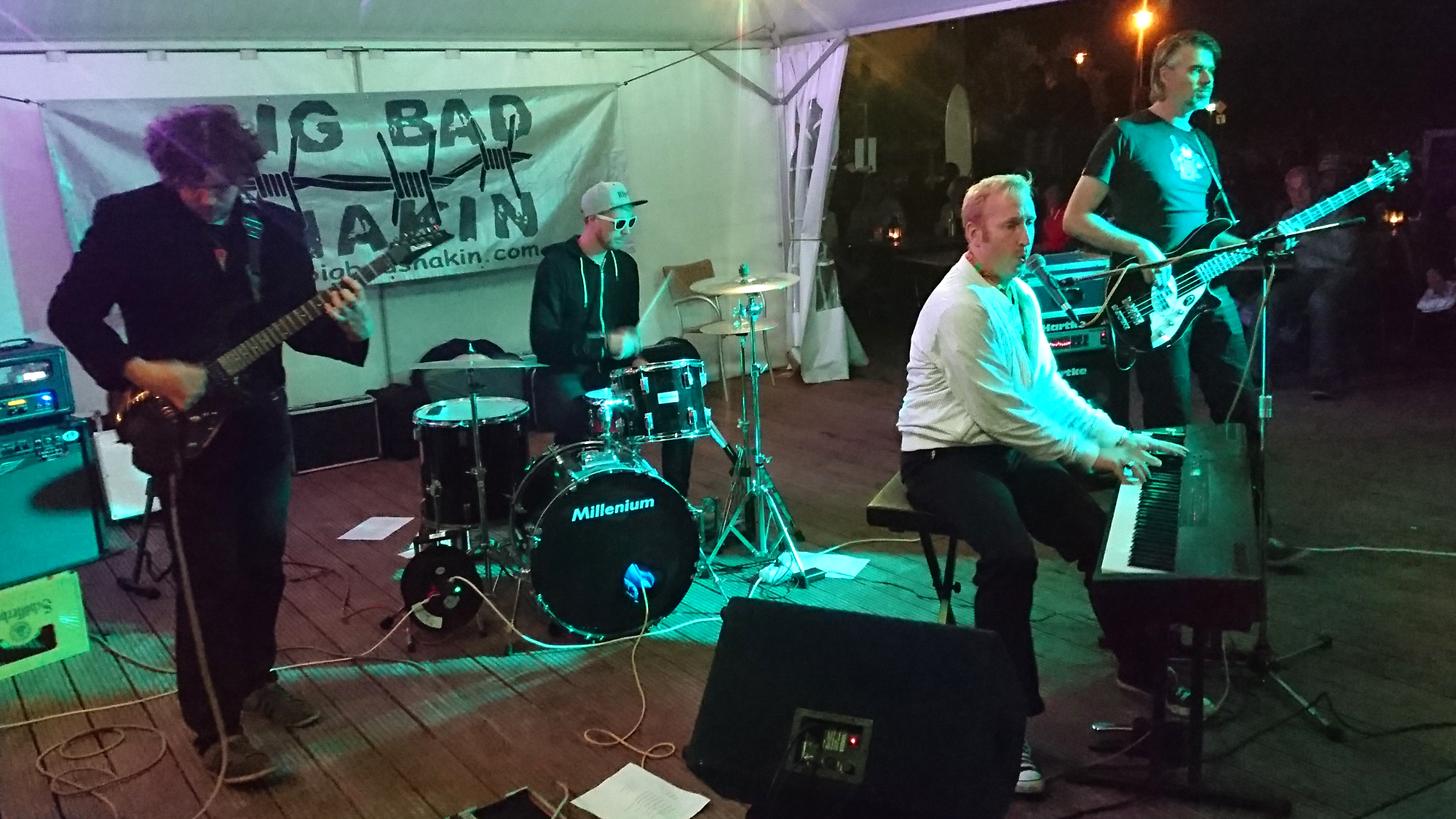 Live in Zingst an der Ostsee am 27. August 2016